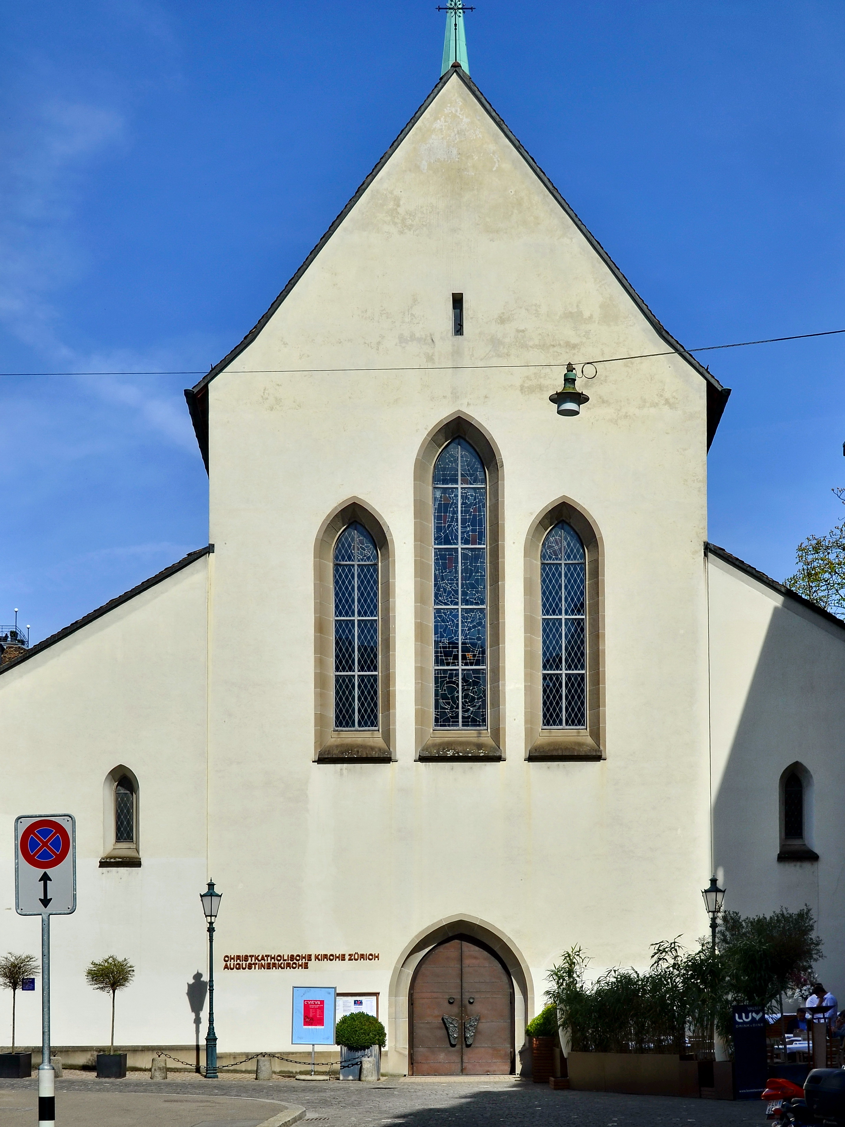 Sechseläuten 2015 : Augustinerkirche in Zürich (Switzerland)